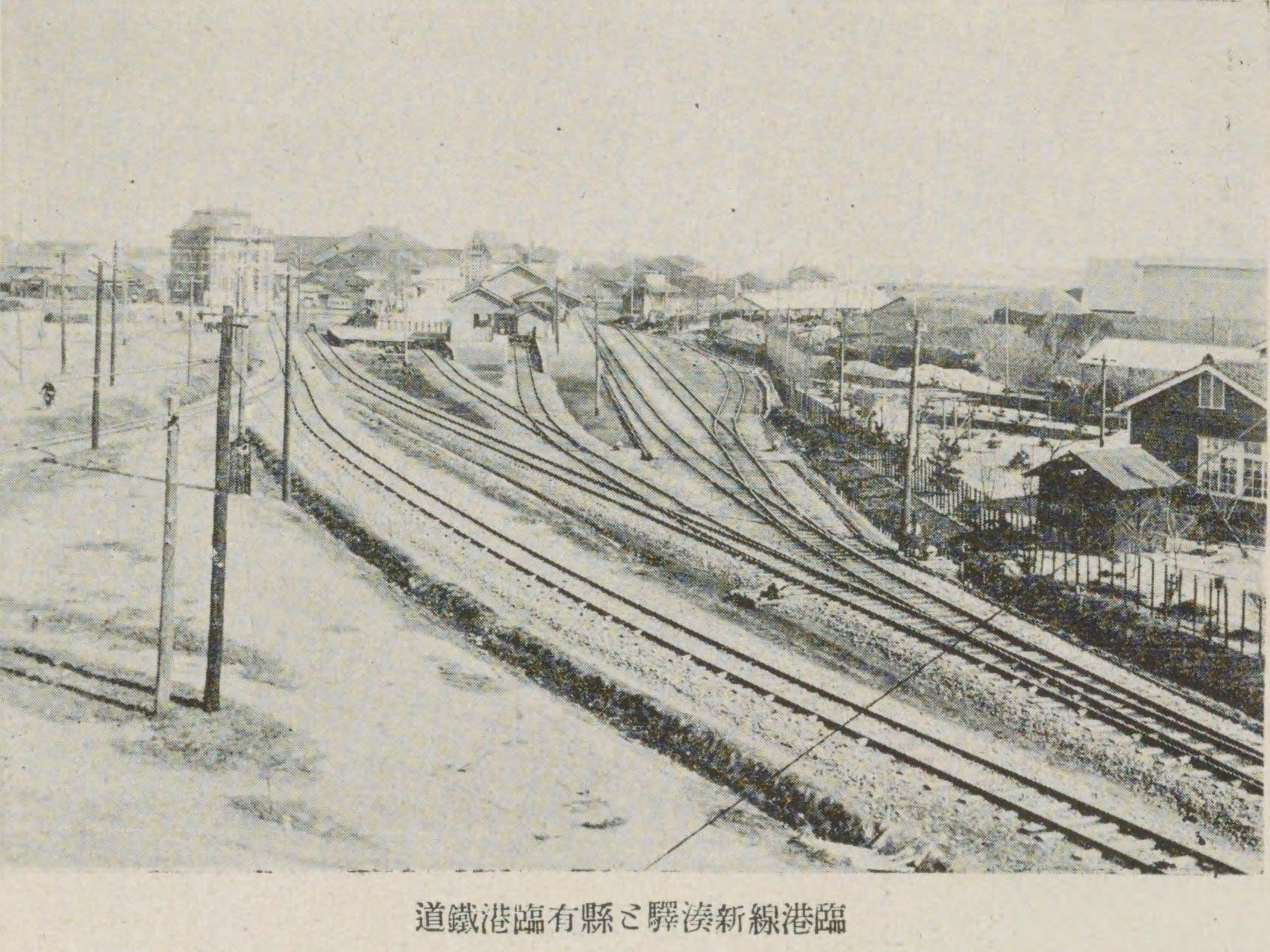 戦前の新湊線新湊駅の様子